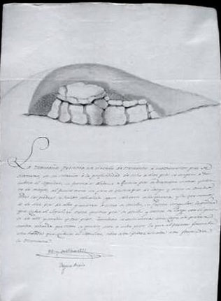 Imagen esquemática del dolmen de Aizkomendi en su estado original.